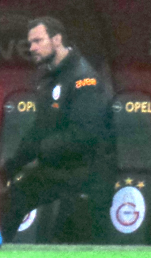 Tomáš Ujfaluši as Sportive director